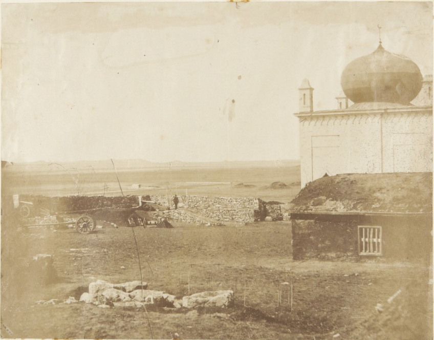 Британская артиллерийская позиция во дворе Керченской мечети, Крымская война, 1855 Princeton University Art Museum